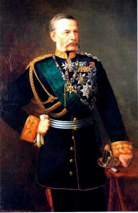 Der sächsische General und Politiker Alfred von Fabrice (1818-1891)